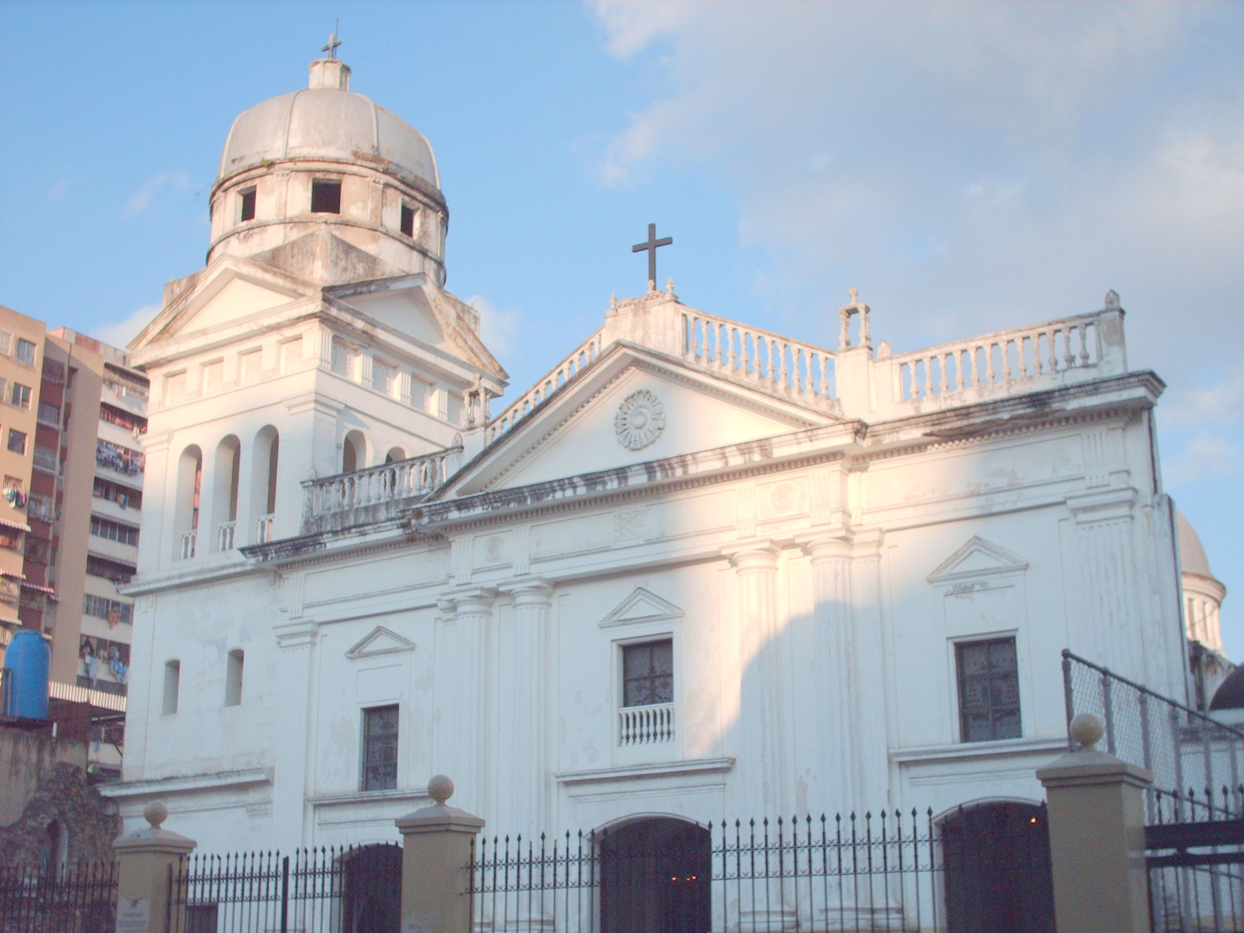 Iglesia Santa Rosalía de Caracas, Monumento Histórico Nacional